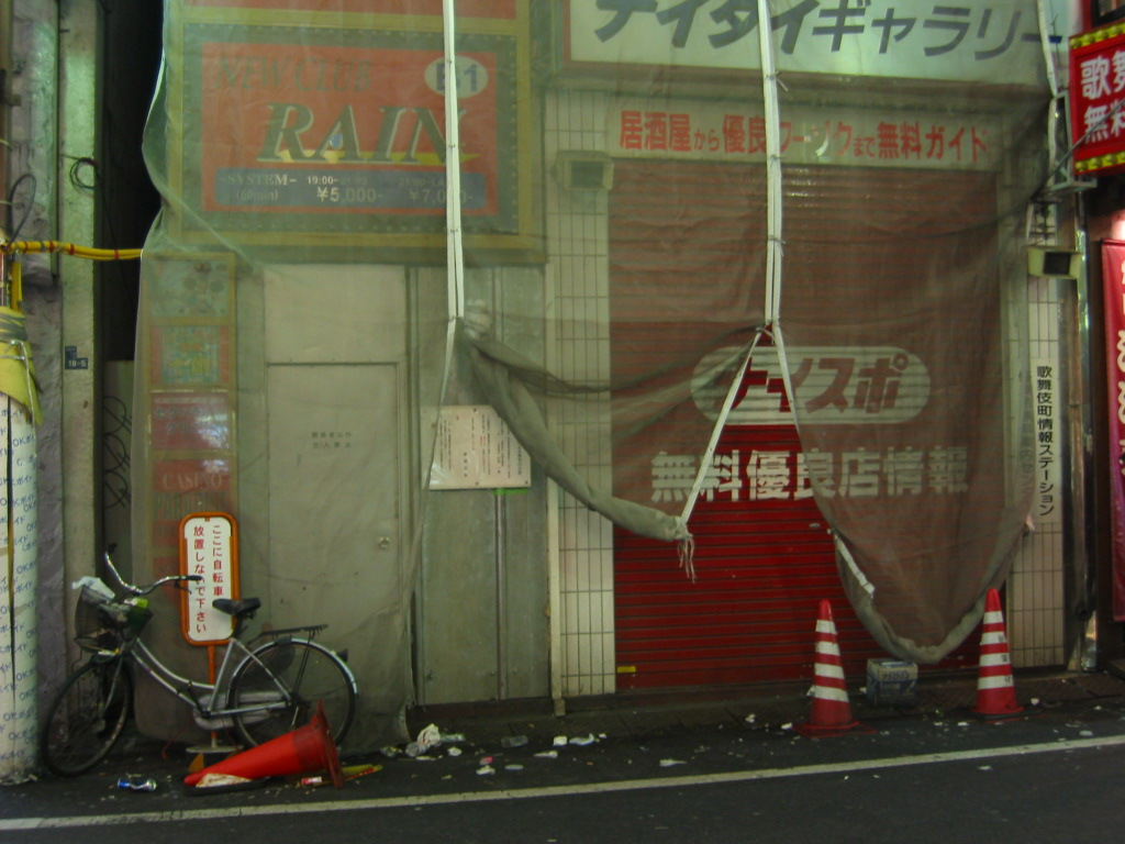 歌舞伎町で火災に遭ったビル。1階正面。